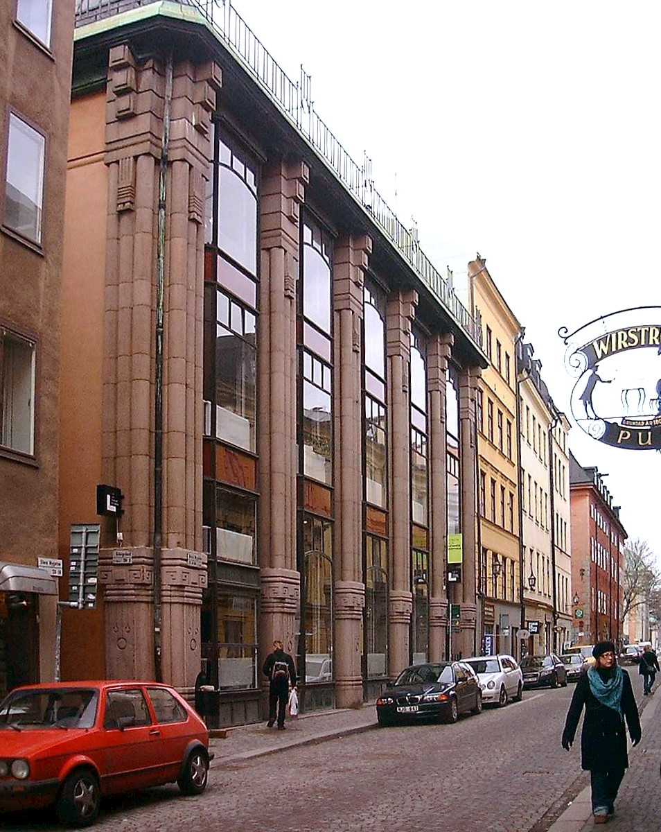 Front of 10-12, Stora Nygatan. Gamla stan, Stockholm.